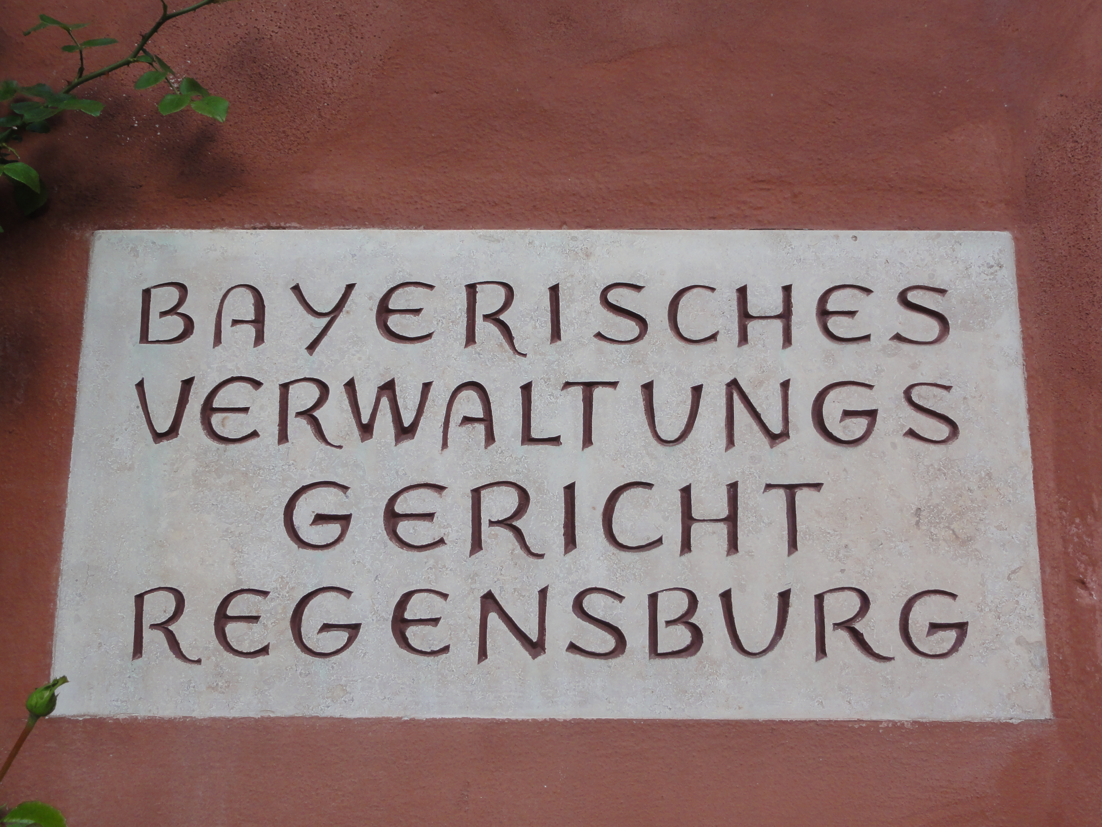 Regensburg - Bayerisches Verwaltungsgericht Regensburg (Schild) Info GPS data may be inaccurate. EXIF data regarding date and time may be inaccurate.